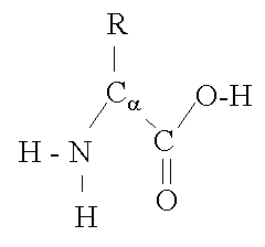 A-amino-acid